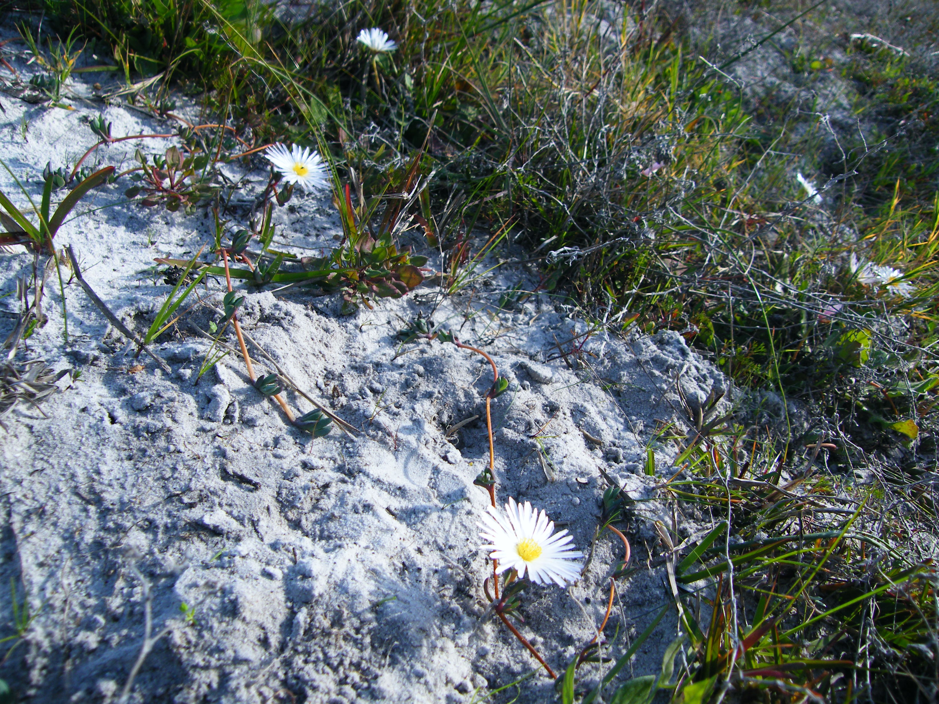 Veldkousie